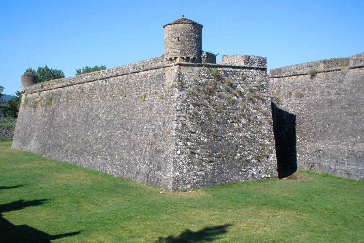 Ciudadela de Jaca (Huesca)